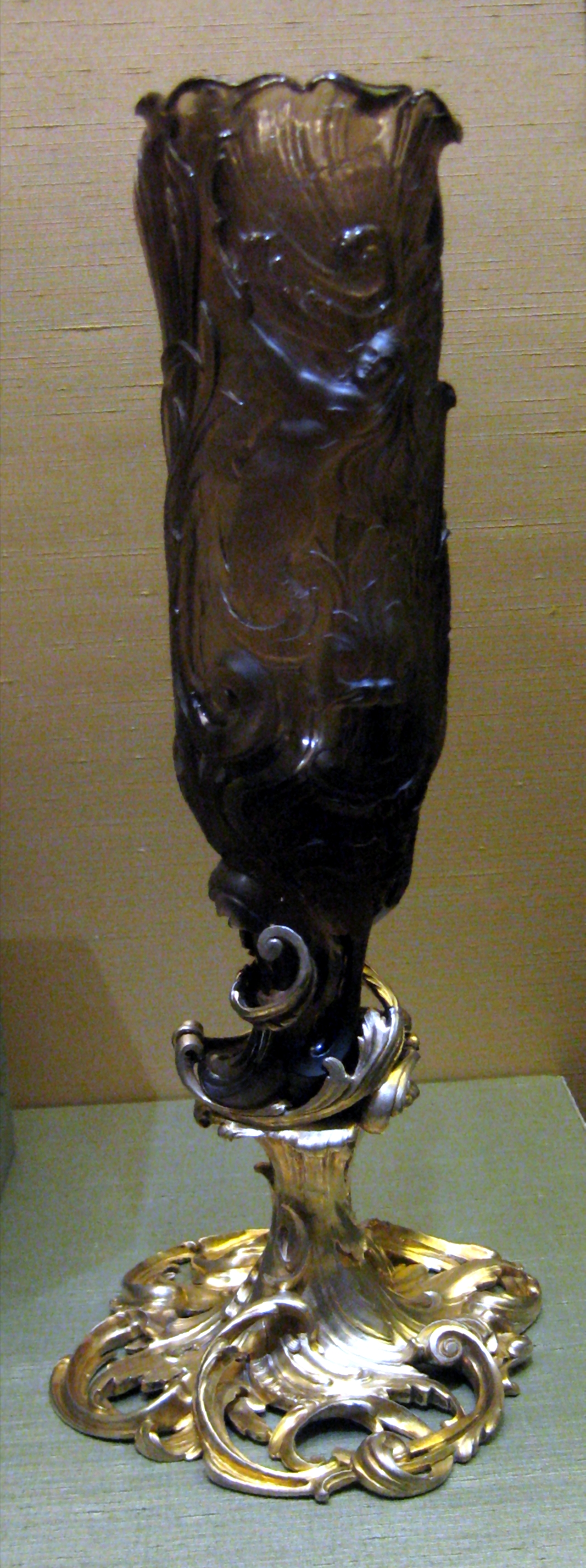 Ваза. 1898, СПб. Фирма К. Фаберже, мастер Ю. Раппапорт. Дымчатый кварц, серебро. Эрмитаж